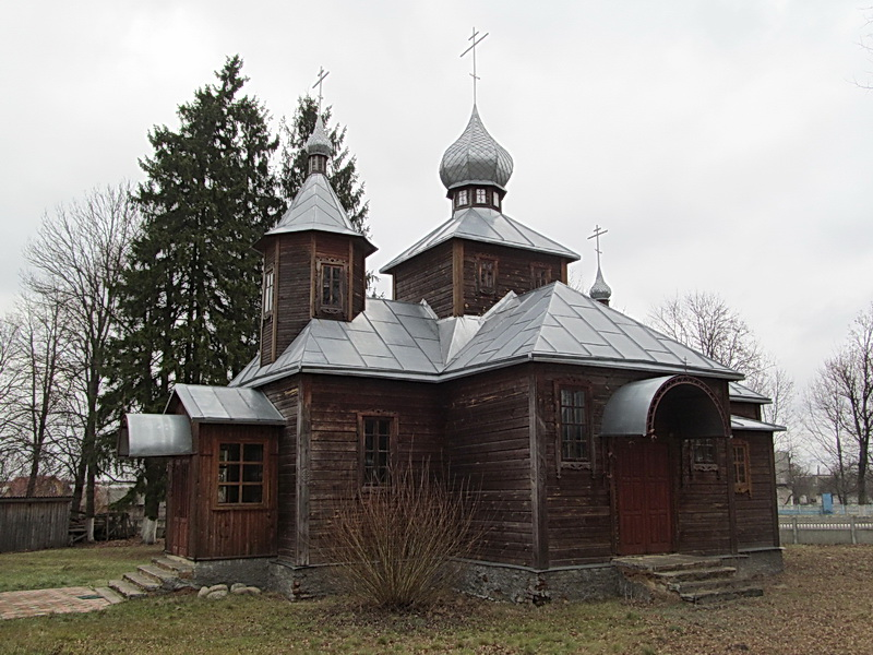 Асавец. Новая царква